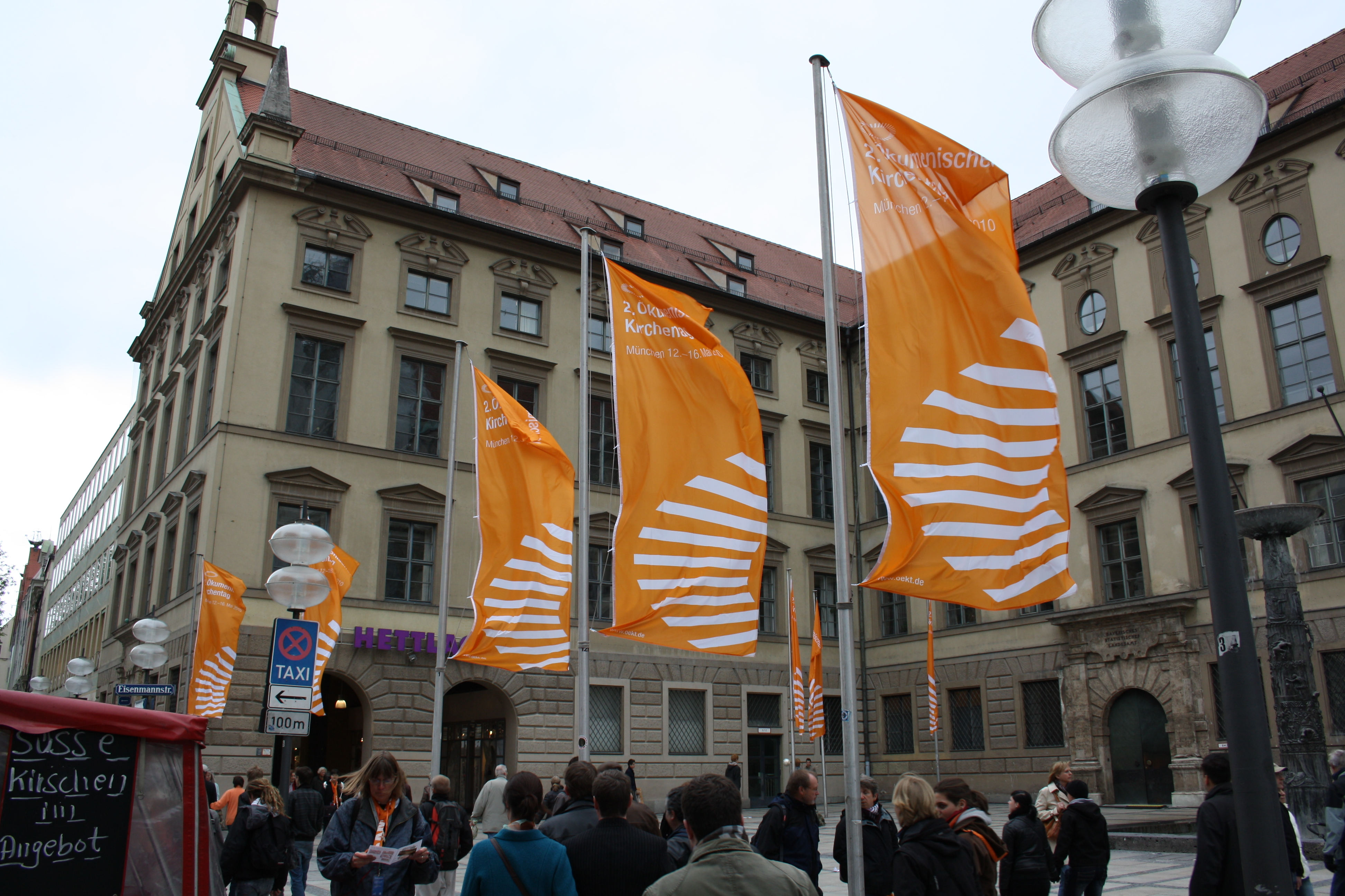 Ökumenischer Kirchentag 2010, München, Neuhauserstraße